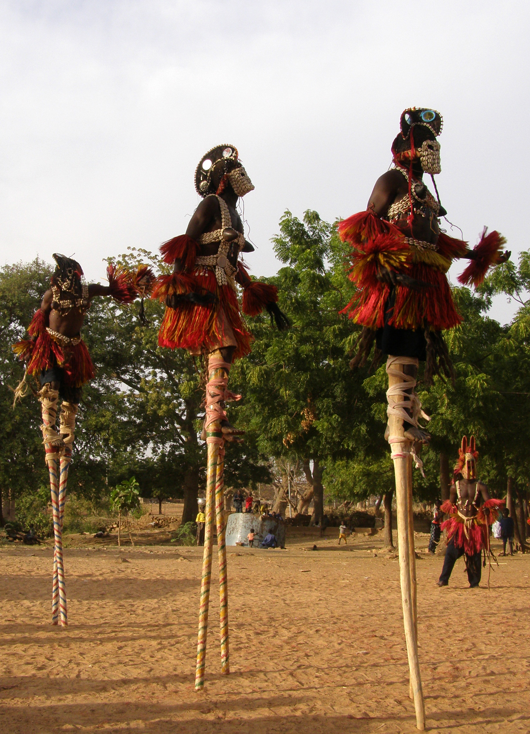 Masques Dogons Pullo Yana (Femme Peule) pendant la danse des masques à Sangha - Falaise de Bandiagara - Mali